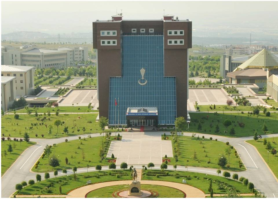 Jandarma ve Sahil Güvenlik Akademisi